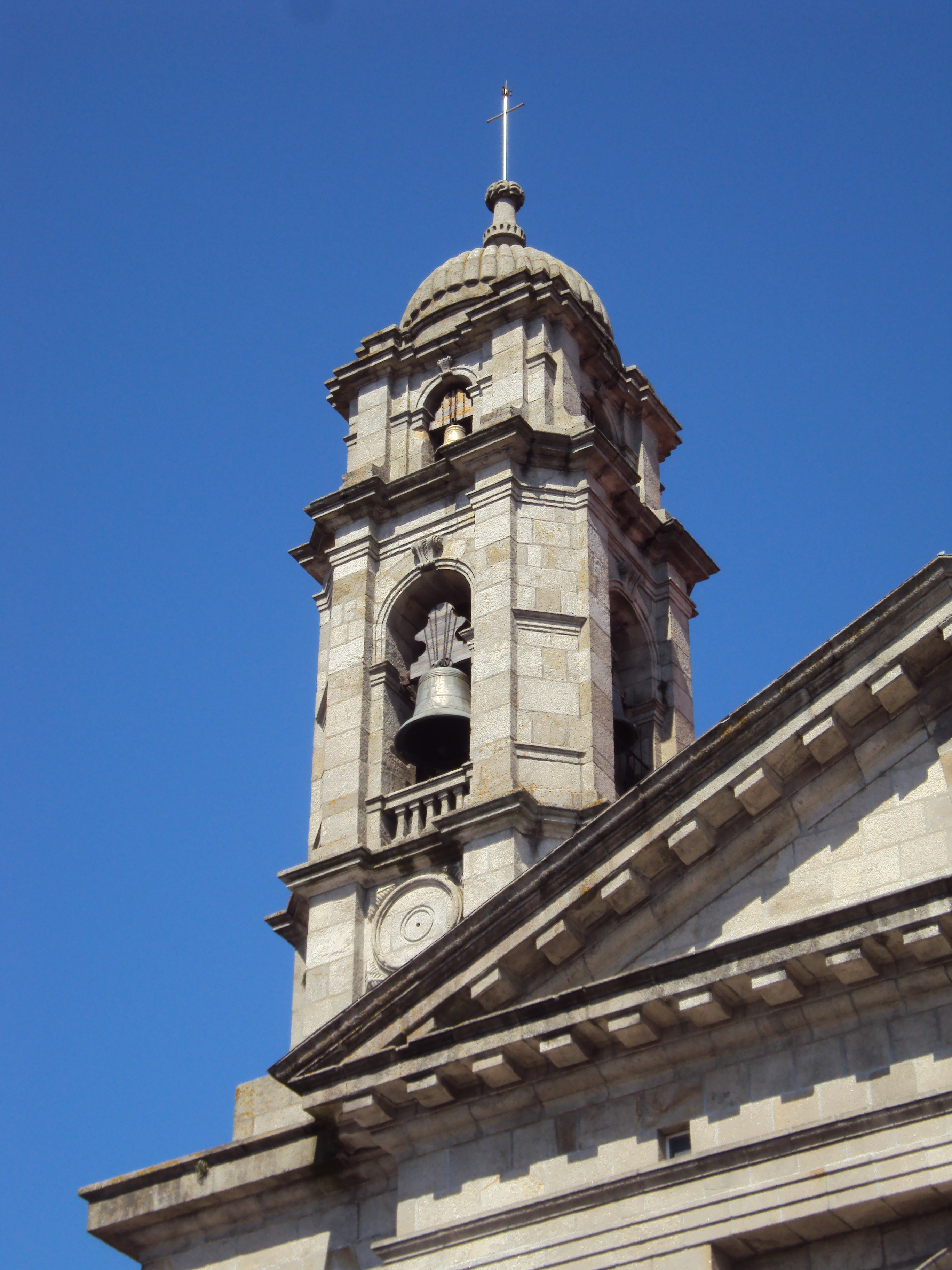 A Concatedral de Santa María de Vigo, antiga Colexiata. Iniciada en 1816 e terminada de construír en 1836, en substitución do templo gótico anterior. De estilo neoclásico, construída conforme ao proxecto do arquitecto Melchor de Prado Mariño, datado en 1811. Alberga no seu interior o soado Cristo da Vitoria que, segundo a tradición, favoreceu aos vigueses nas Guerras Napoleónicas. Cada primeiro domingo de agosto sae en procesión dentro da maior manifestación relixiosa da cidade.